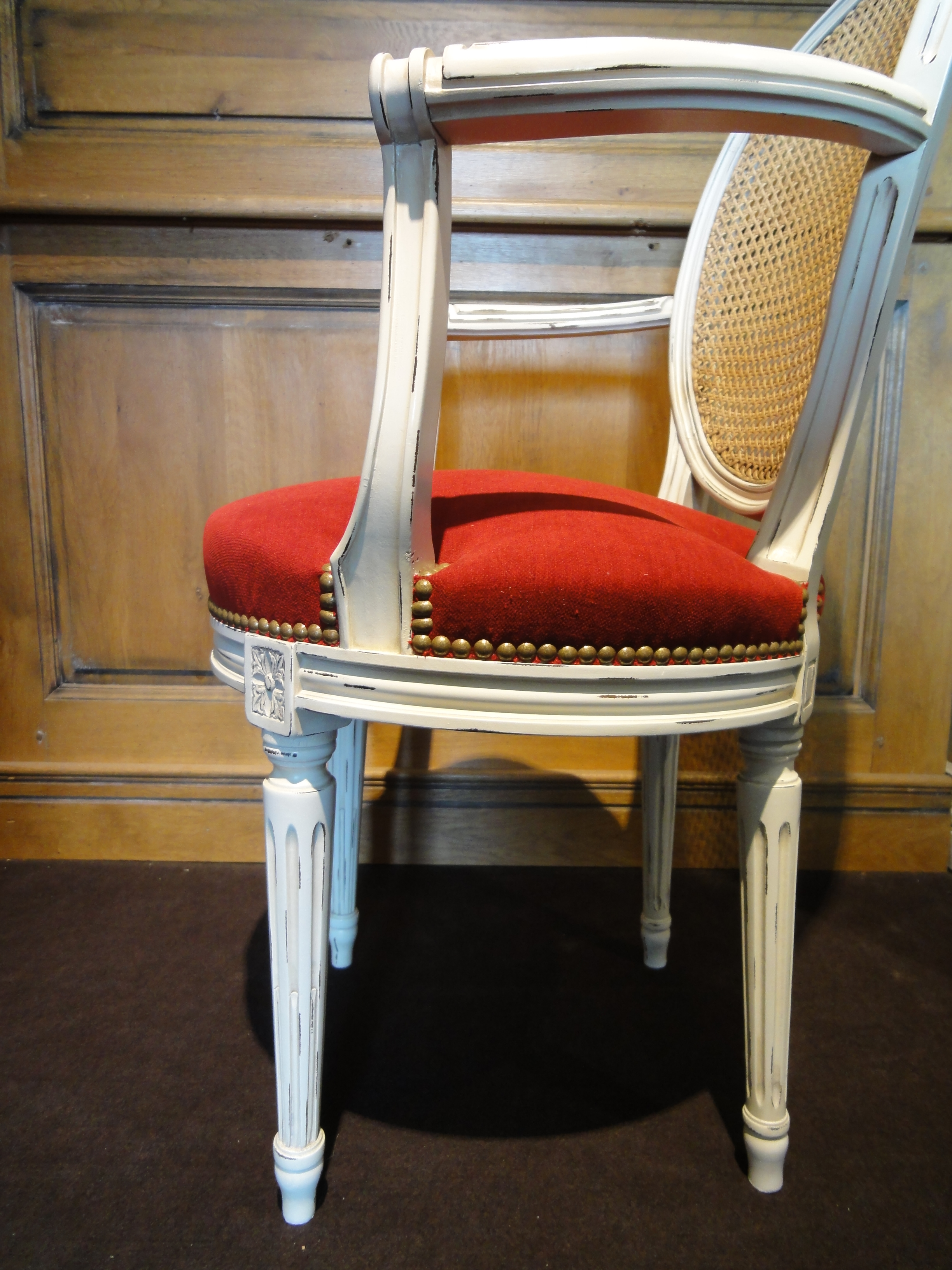 Style Louis XVI, réalisé par les Ateliers Allot Frères.